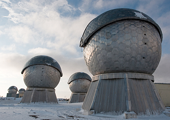 Оптико-электронный комплекс контроля космического пространства ОЭК «Окно» (г. Нурек, Республика Таджикистан)